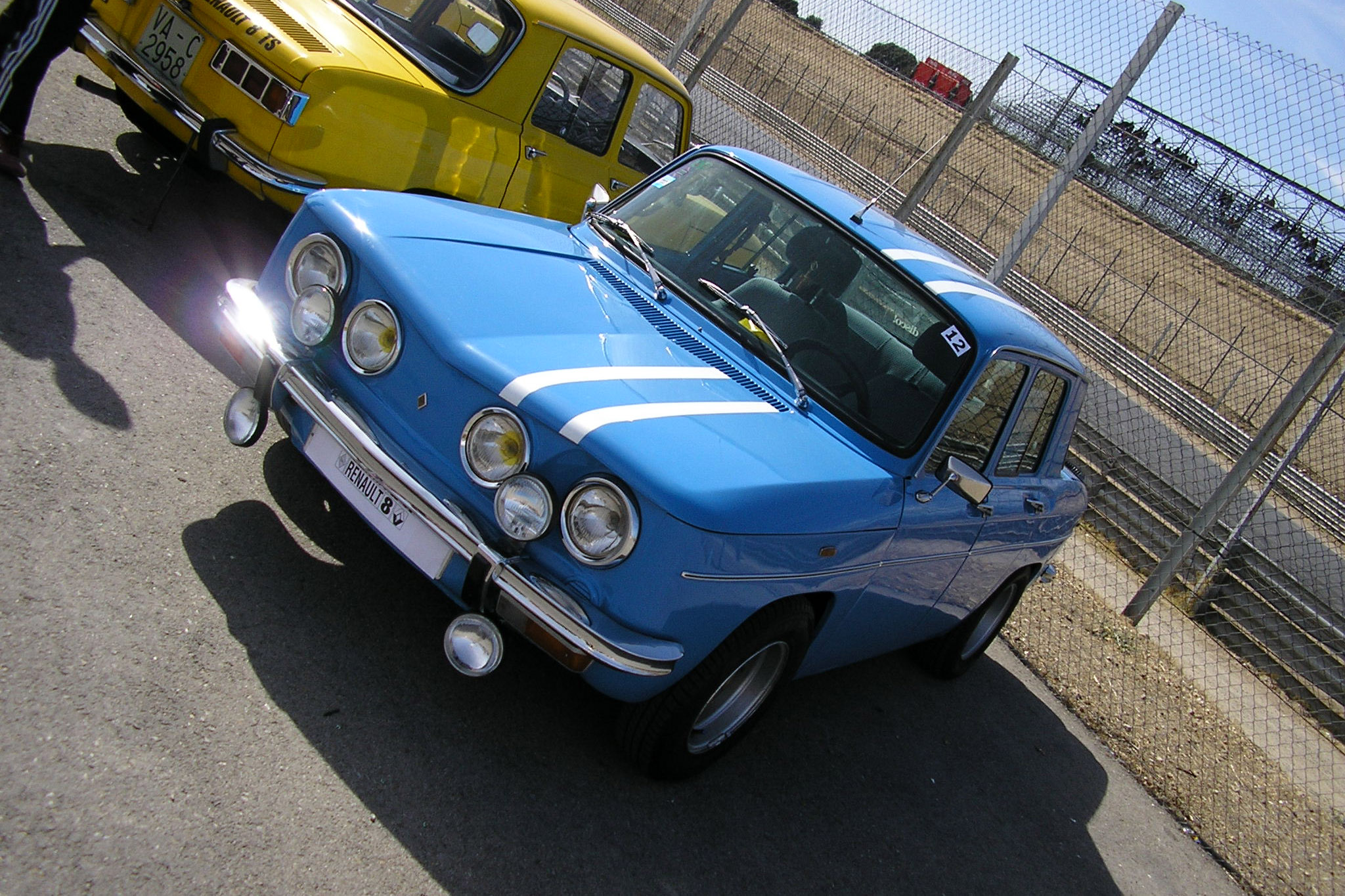 Renault 8 shown in Circuito del Jarama (Madrid). Jornada de puertas abiertas 2006.